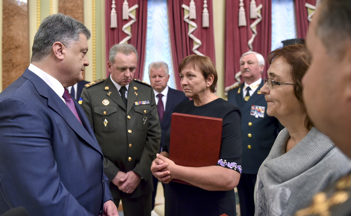 Президент України вручив ордени «Золота Зірка» Героя України матерям двох загиблих Героїв АТО — солдата Ігоря Брановицького та капітана Сергія Колодія.